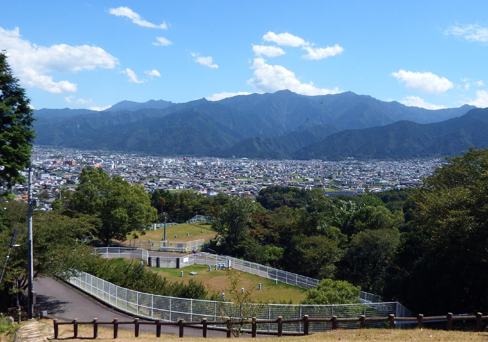 新居浜市の滝の宮公園から同市市街。後方は西赤石山や上兜山。